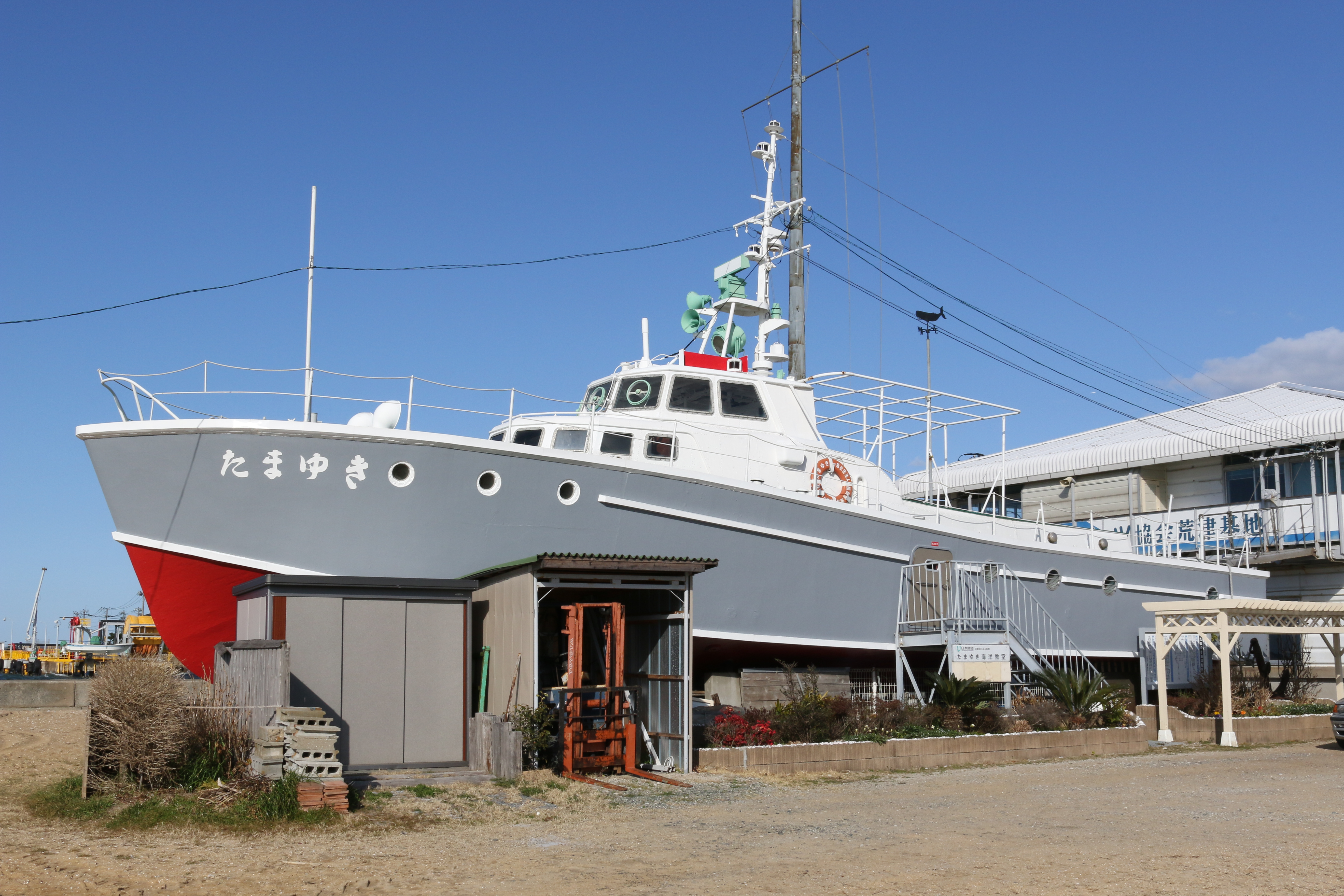 1981年に解役後、海洋教室として活用されている元PC42 たまゆき。 外板等は整備されており、現役当時のものとは異なる。